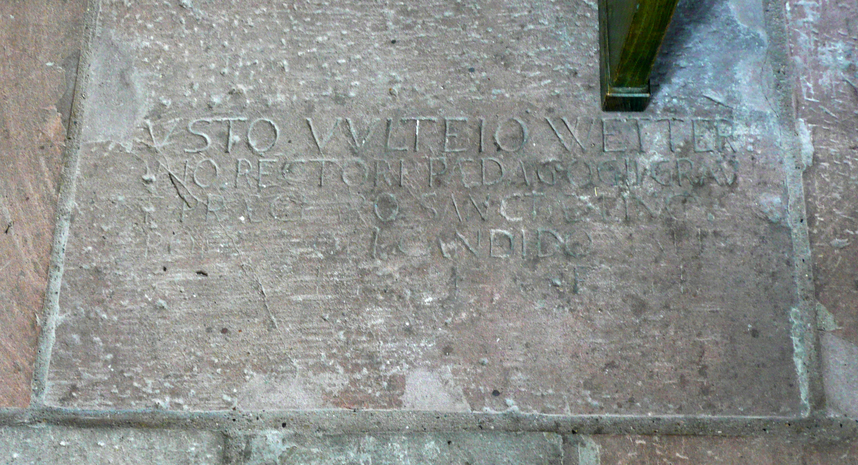 Grabstein des Justus Vultejus aus Wetter von 1575 auf dem Fußboden in der St. Michaelskapelle ("Michelchen") in Marburg. Inschrift: JUSTO VULTEIO WETTER ANO RECTORI PAEDAGOGII GRAVI ET PRAECLARO SANCTAE LINGUAE PROFESSORI CANDIDO MARITO DULCISSIMA KATHARINA FETTIA HOC MONUMENTUM f. f. Ch 12 (Otto Stölzel, Marburgs alte Grabschriften)